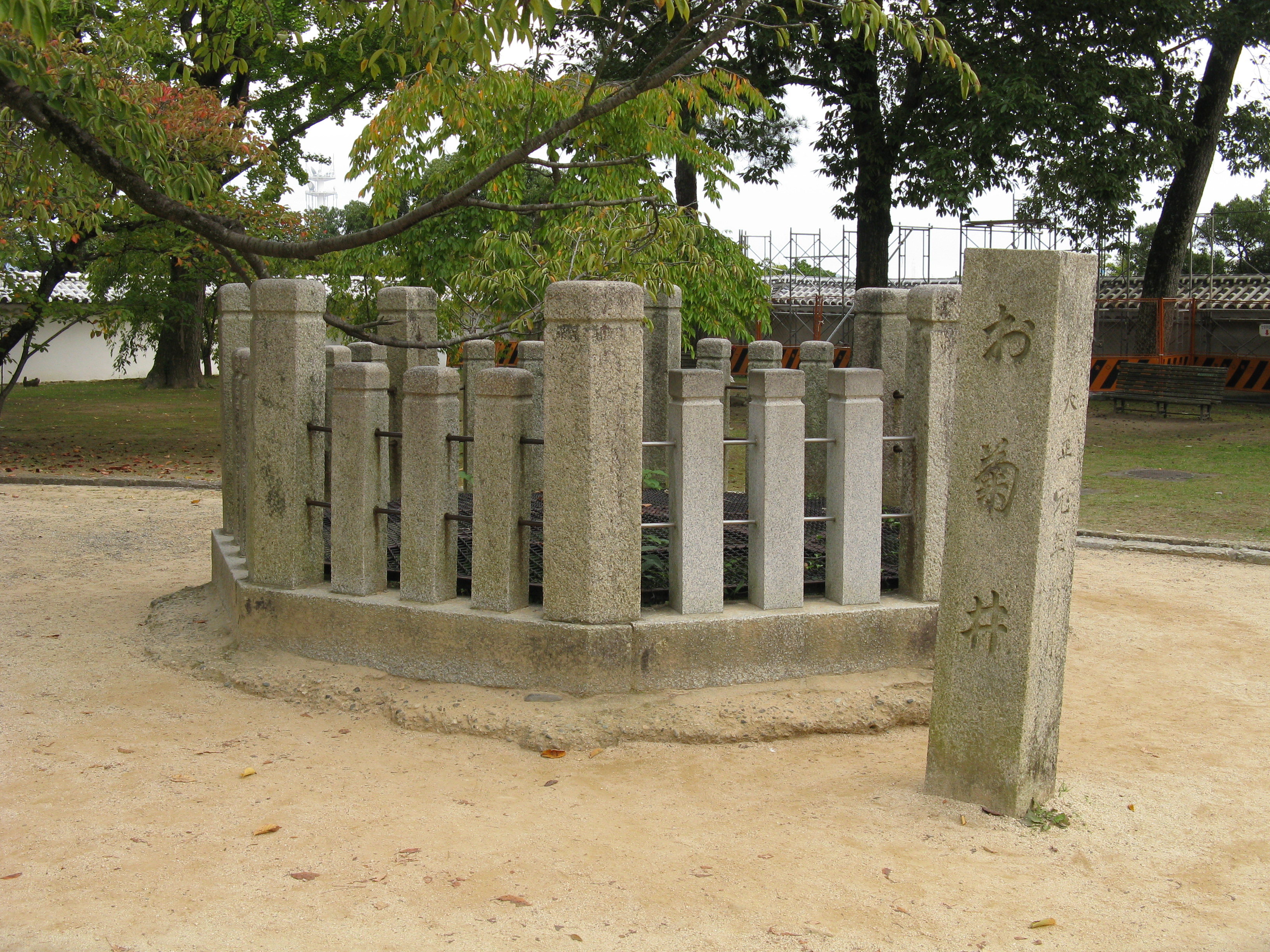 姫路城 お菊井